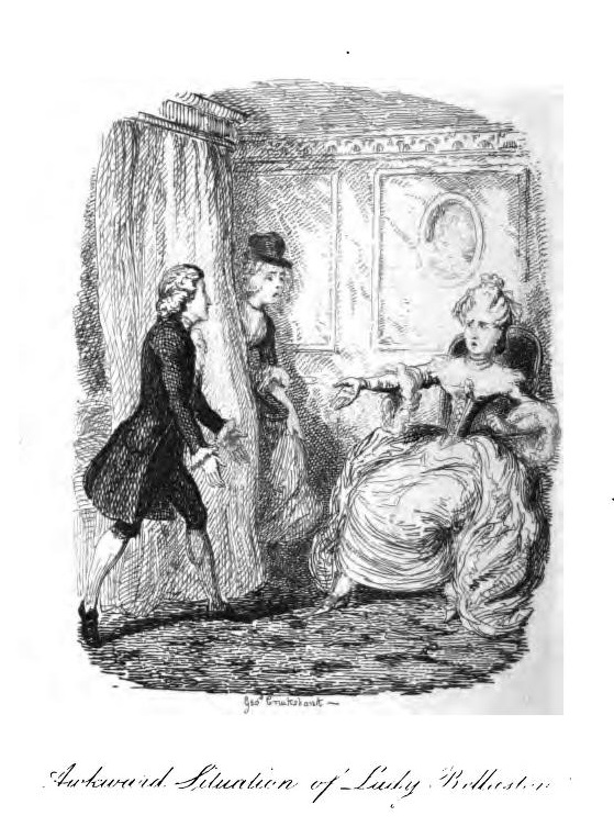 Illustration de George Cruikshank pour une édition de Tom Jones chez George Bell and Sons, livre XV, ch. VII. Scène de vaudeville : Lady Bellaston est surprise et choquée de découvrir qu'une femme (il s'agit d'Abigel Honour, la suivante de Sophia, venue dire à Tom que Mr Western a emmené sa fille et l'a congédiée) était cachée dans la chambre où elle est venue rejoindre Tom Jones.